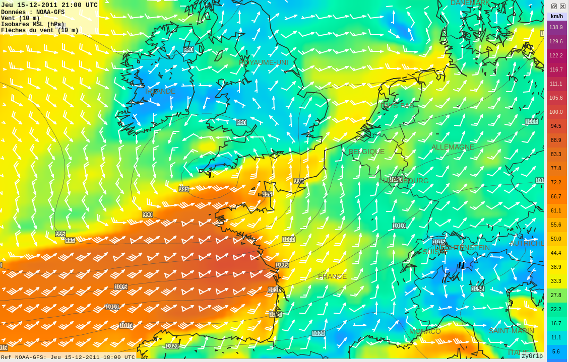 Visualisation de fichier NOAA-GFS dans zyGrib pour la tempête Joachim du 15 décembre 2011